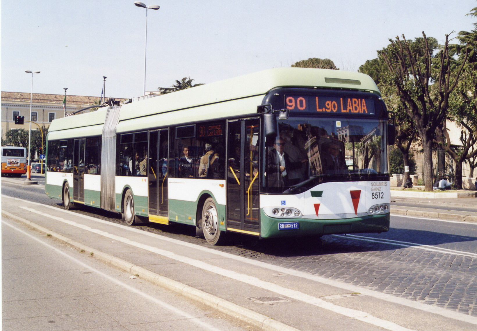 Filobus Solaris Trollino 18 metri, ATAC n. 8512, in piazza dei Cinquecento (Stazione Termini)